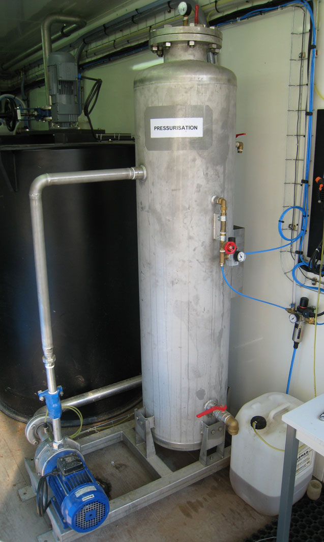 Ballon de pressurisation pour traitement des eaux résiduaires